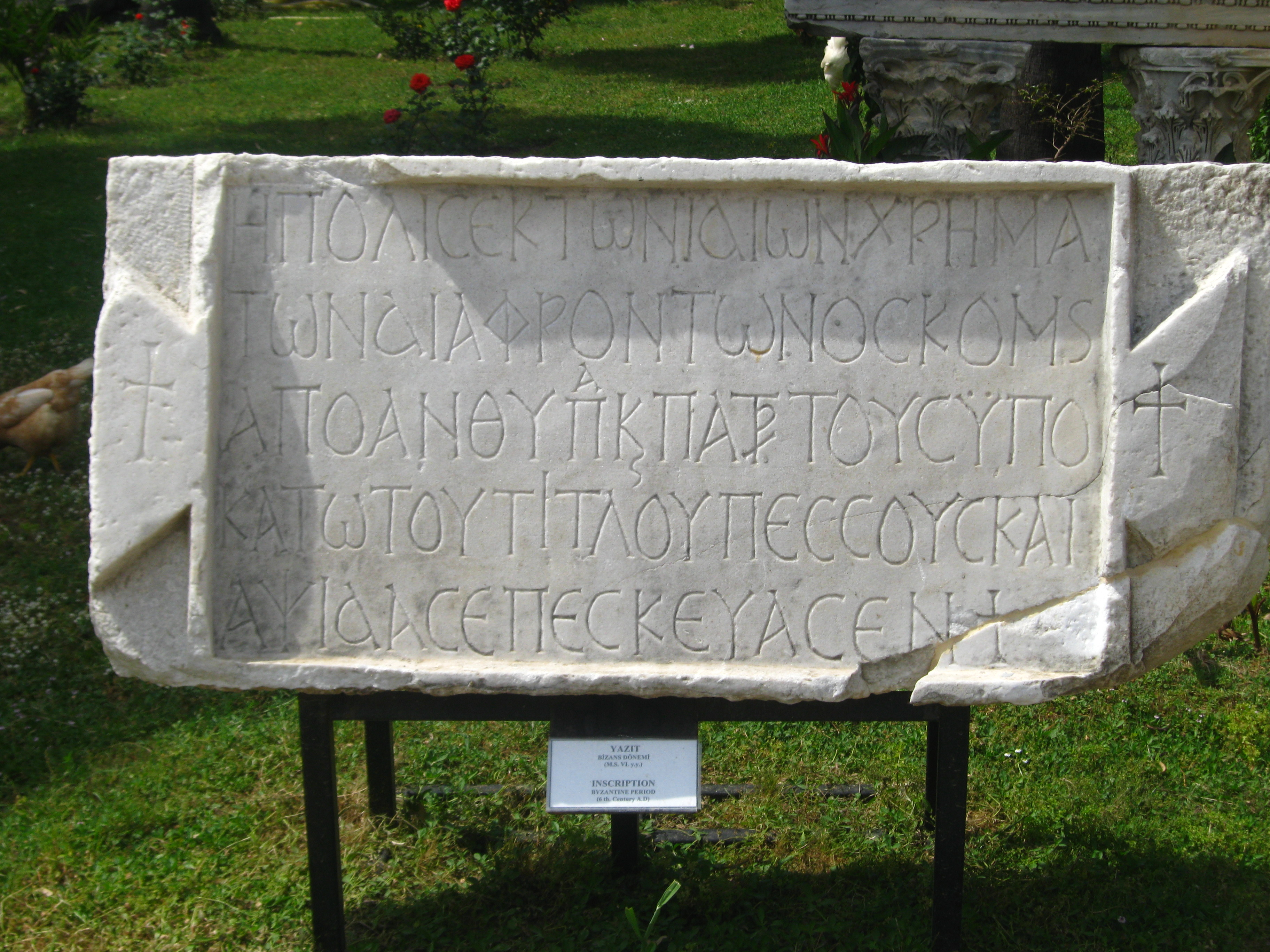 Плита з інскрипцією